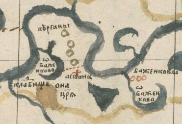 Скан фрагмента листа 107 "Хорографической чертёжной книги Сибири" С. У. Ремезова, содержащий упоминание термина "астана".